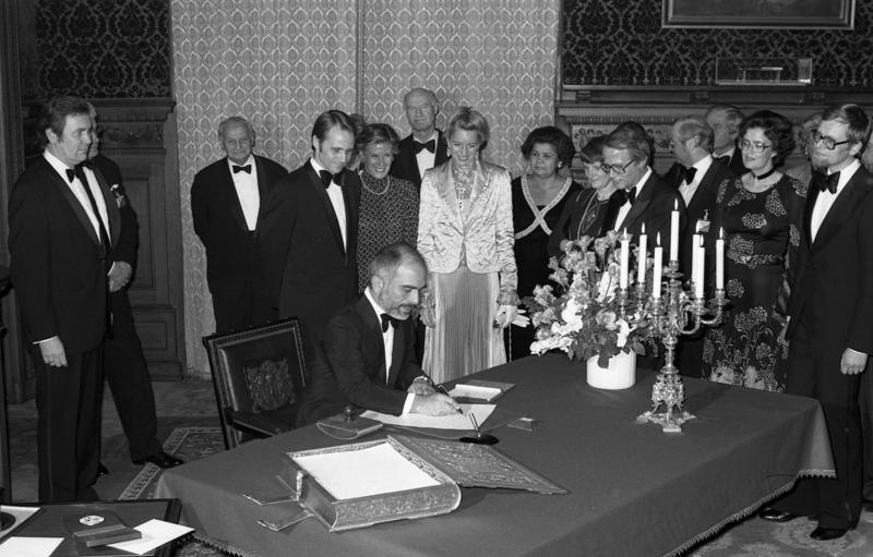 Staatsbesuch König Hussein II. und Königin Nur Al-Hussein in der Bundesrepublik Deutschland. Eintragung in das Goldene Buch im Rathaus.